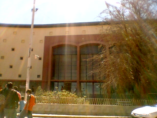 Xhuquicamat el dia de su despedida